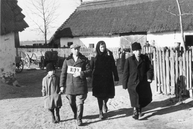 Wartheland, Ansiedlung deutscher Bauern aus Ostpolen, Mai 1940